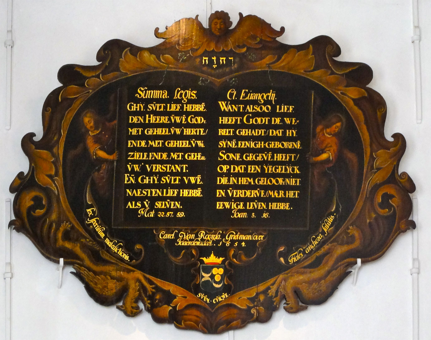 Sint Pieterkerk van Grou (gebodenbord